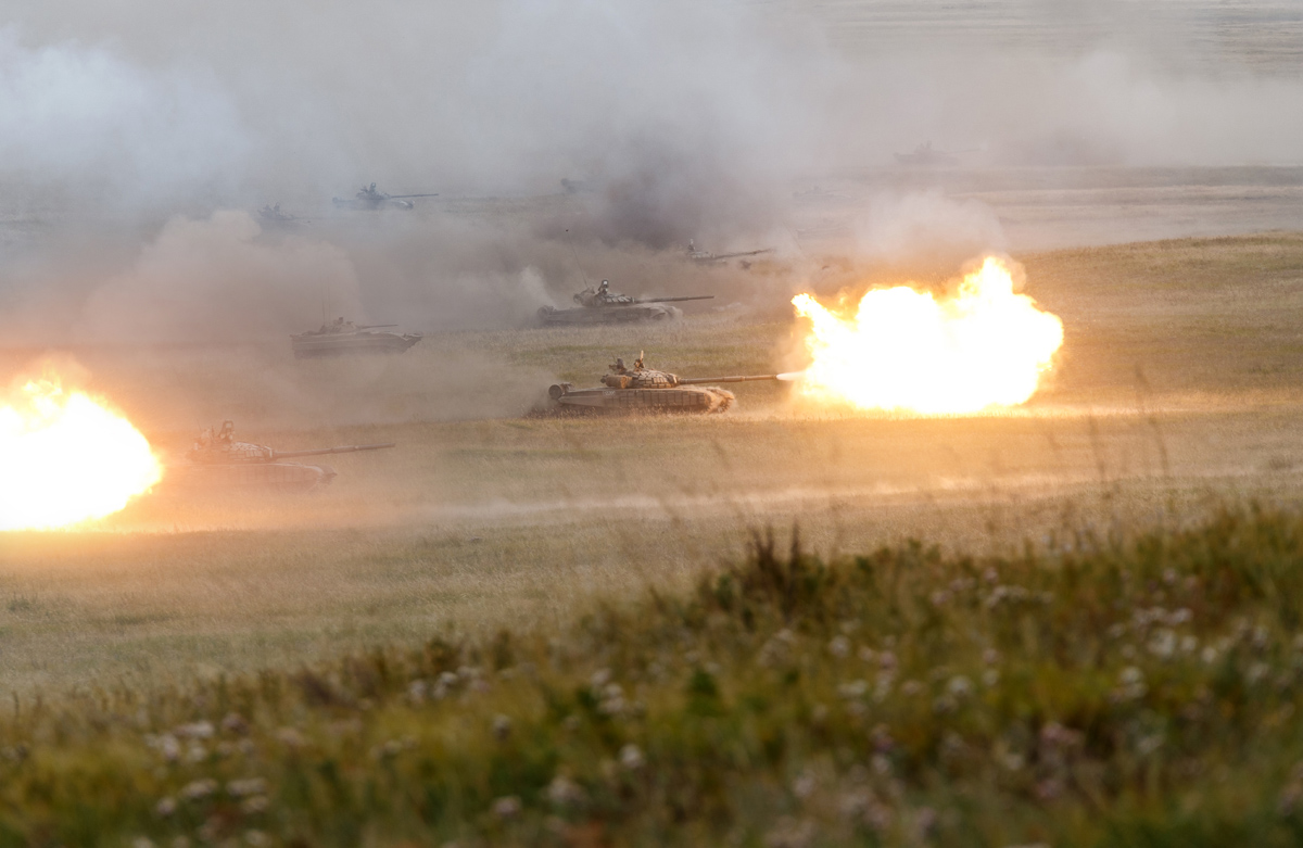 Активная фаза манёвров «Восток-2018».